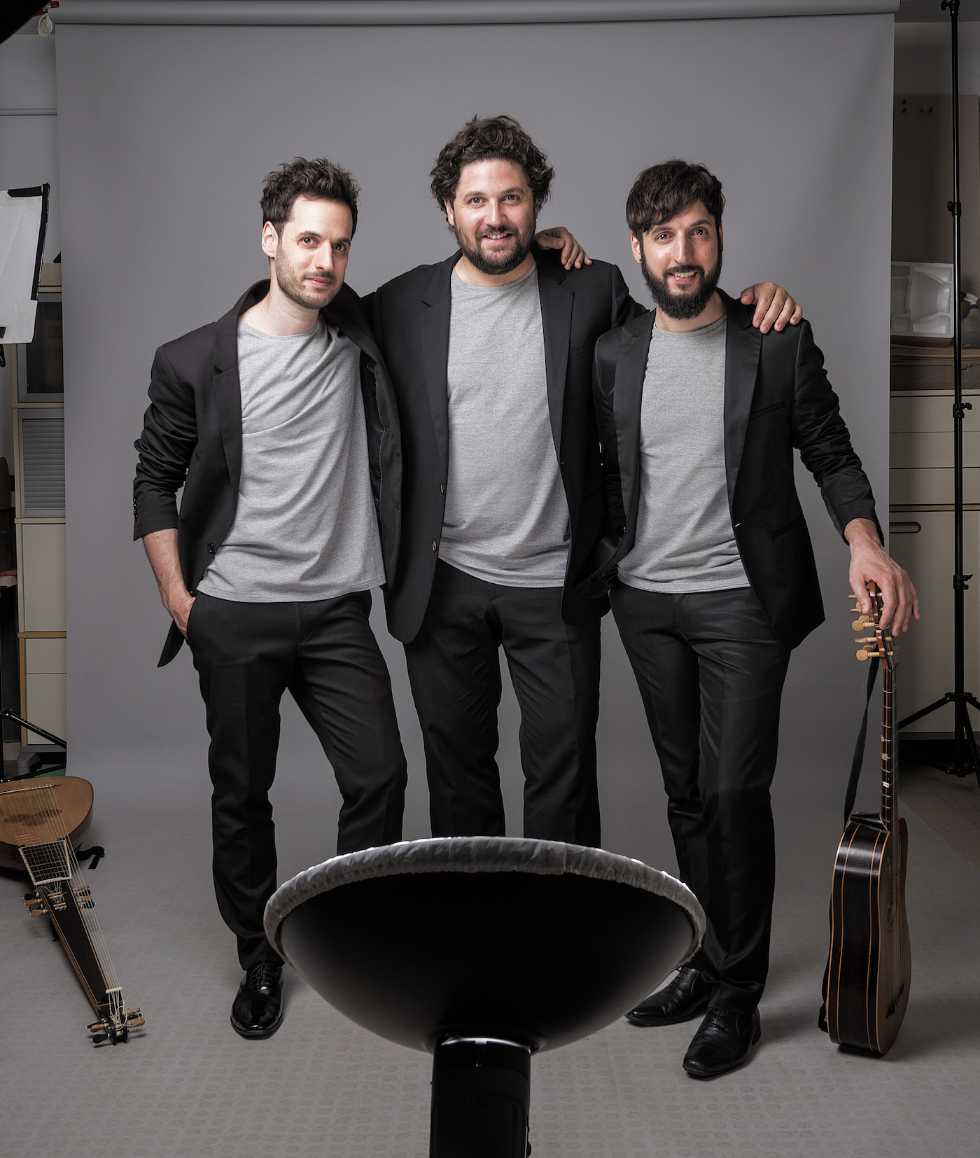 Los hermanos Zapico conforman Forma Antiqva, una formación barroca que va desde el trío hasta el grupo orquestal.